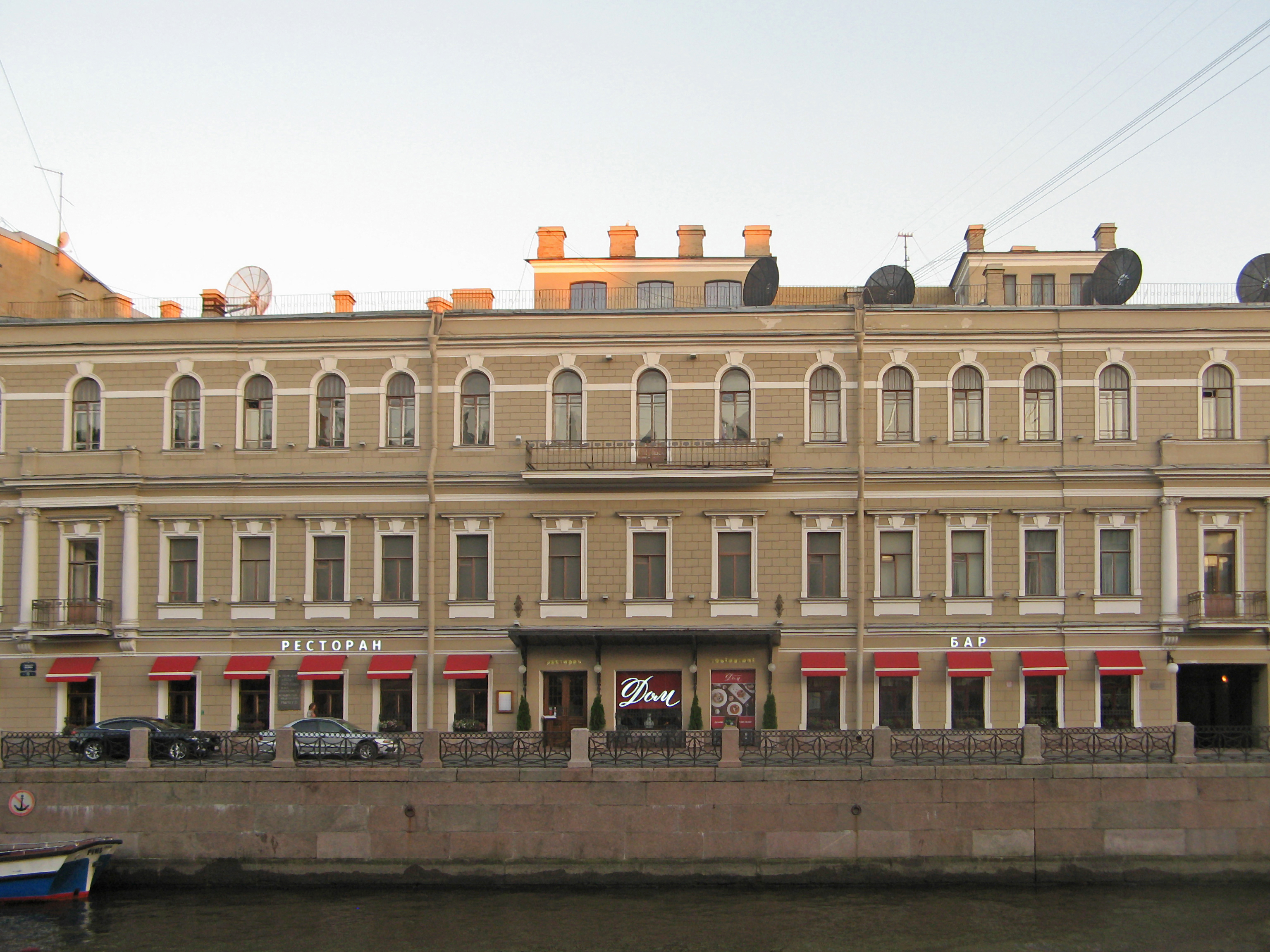 Дом, где в первой половине XIX в. размещалась Российско-Американская компания и где жил Рылеев К.Ф.: набережная р. Мойки, 72, Адмиралтейский район, Санкт-Петербург